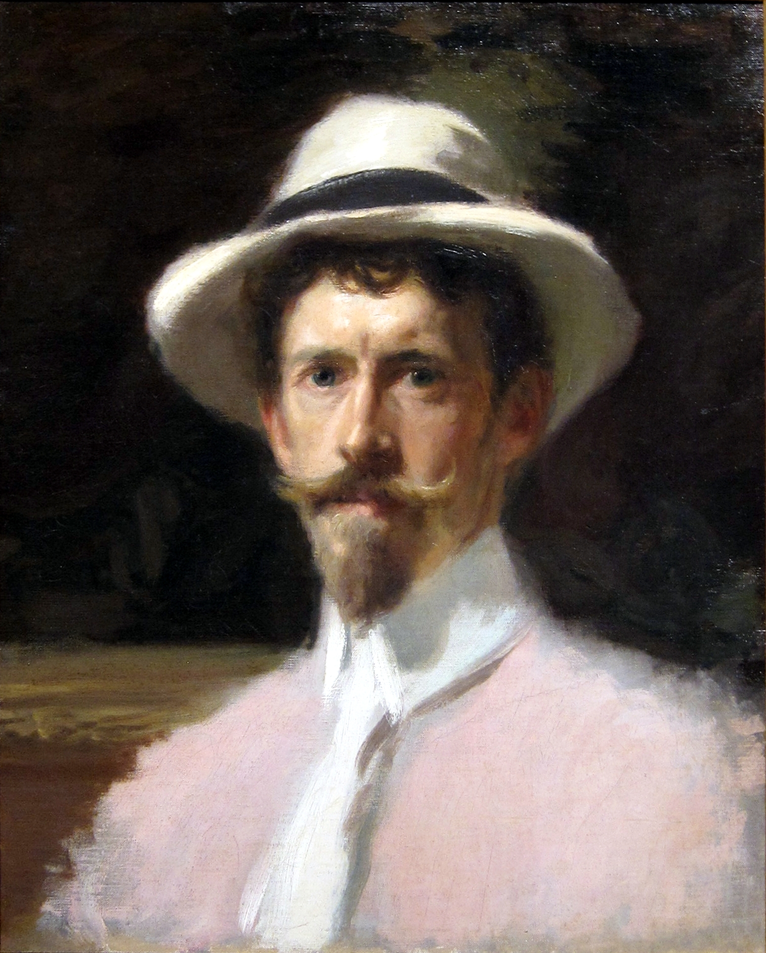 Autoportrait à l'Art Institute of Chicago.